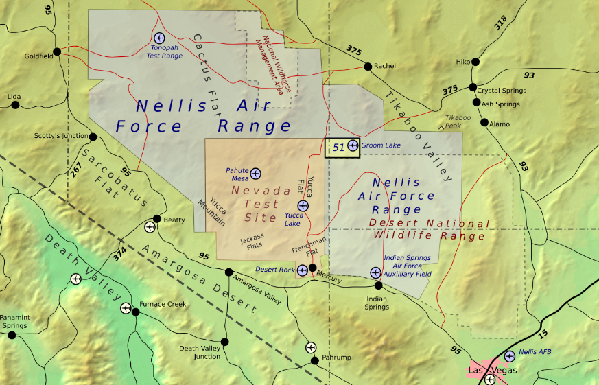 Area 51 ohne Legende